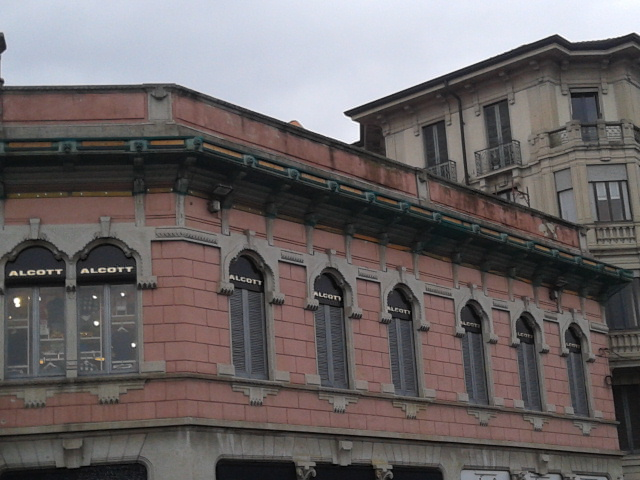 Ex Autorimessa Fiat-Fossati!, facciata laterale